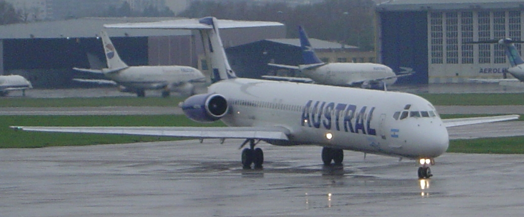 Un avión MD80 de Austral con el esquema de pintura 2007.JPG